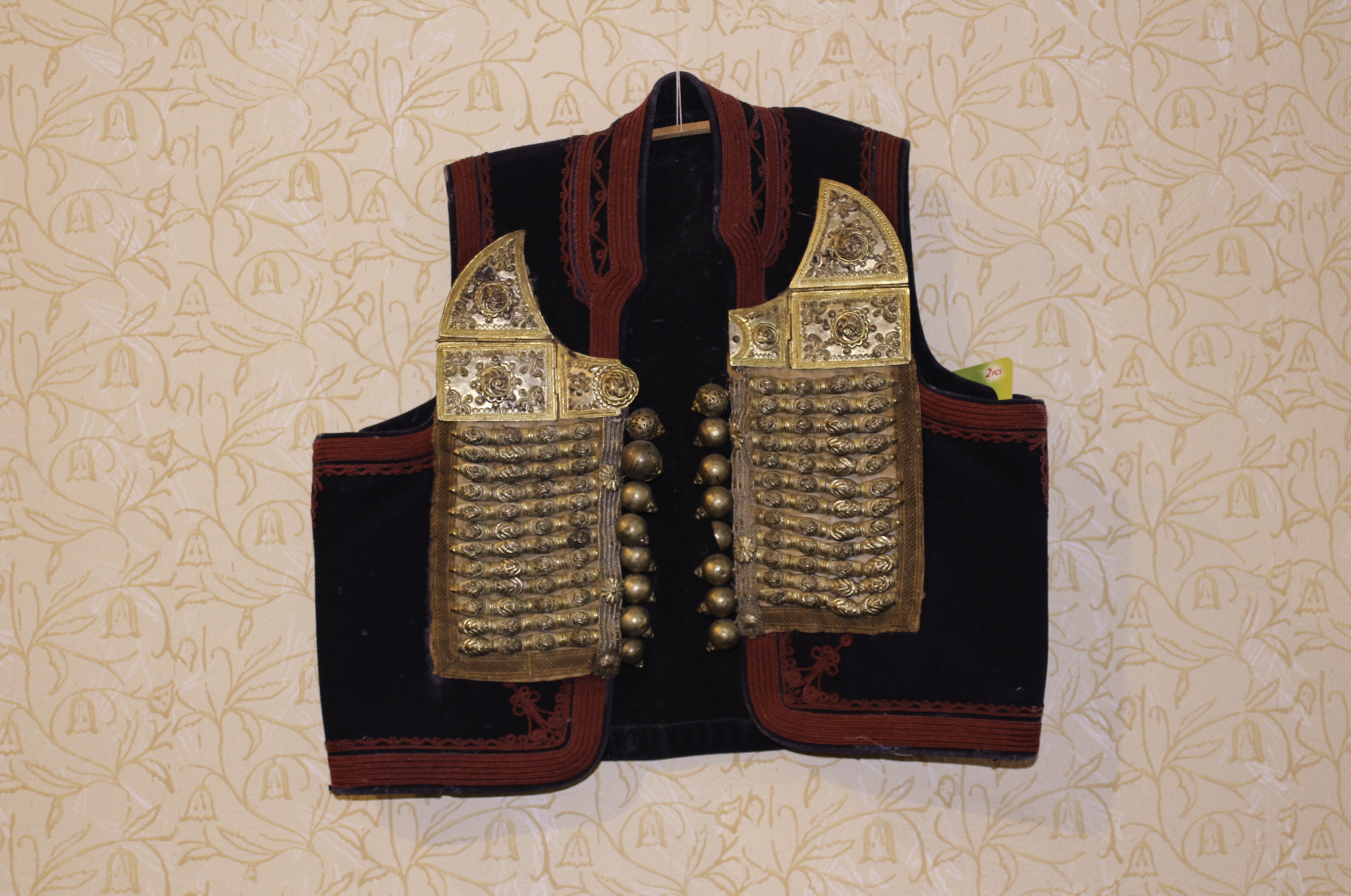 Toke, muški odjevni predmet - dio etnografske postavke u Muzeju Stare Hercegovine u Foči.